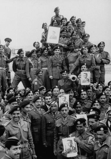 صورة تاريخية نادرة لجلالة الملك الحسين المغفور له ،مع سلاح الدروع الملكي الأردني قديما